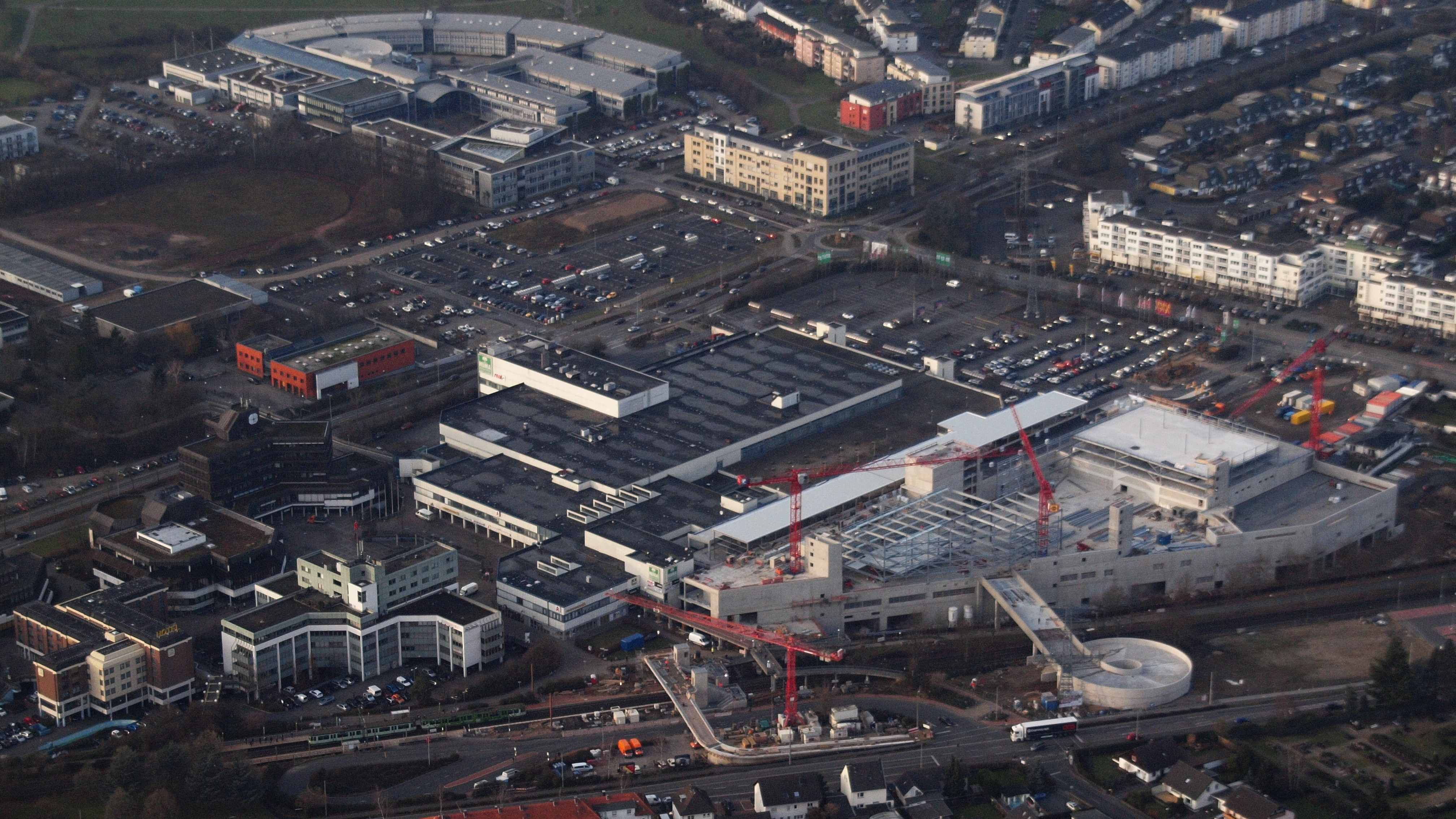 Sankt-Augustin - Neubau Huma Einkaufspark, Luftaufnahme (2015)